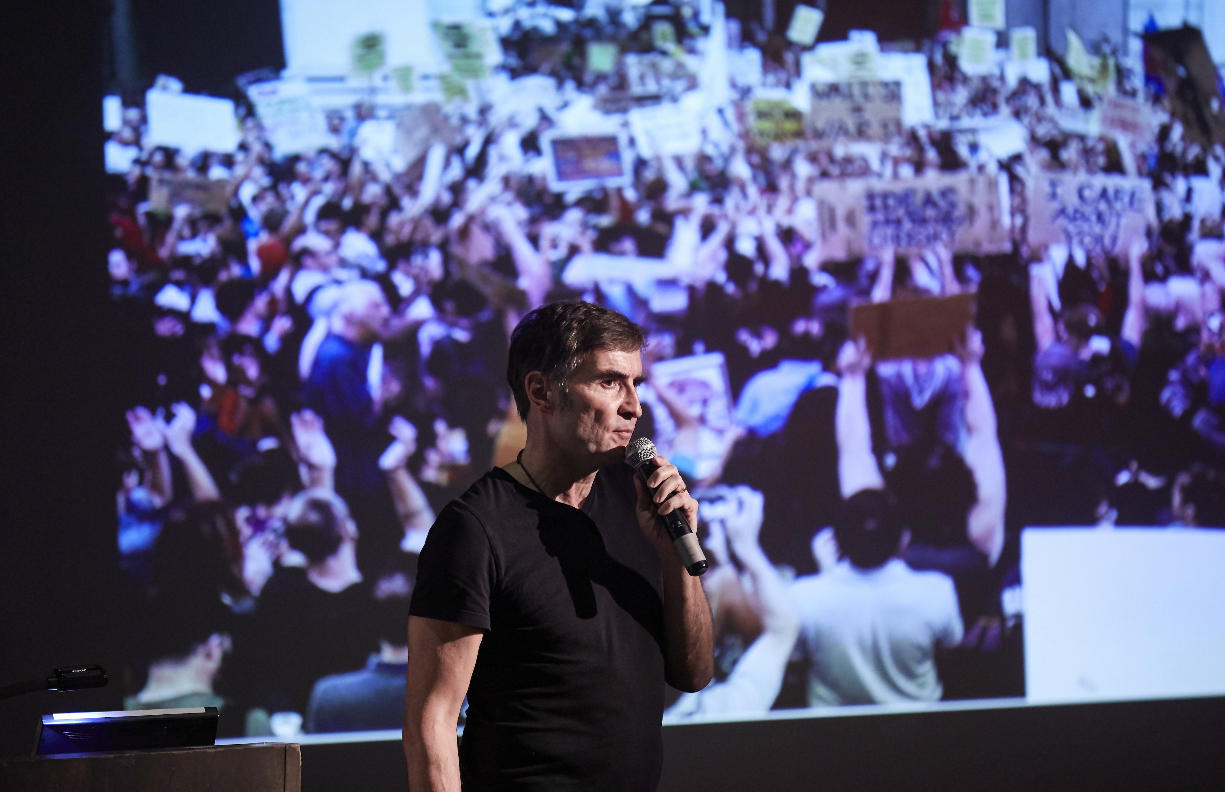 Lesung: public preposition - the notion of public spheres